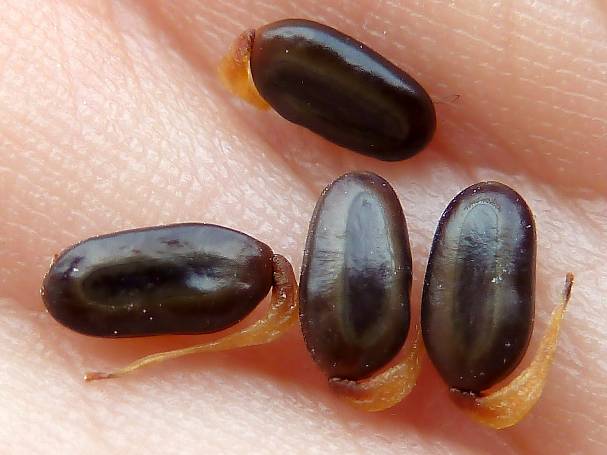 Acacia saligna - Semillas sueltas con su funículo retrotorcido persistente y sus características pleurogramas. - Cultivado/ornamental, Centro de Salud Norte, Águilas (Murcia, España).